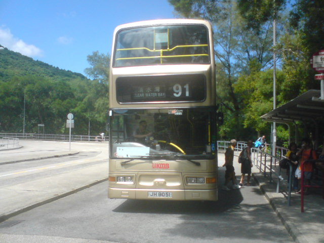 清水灣巴士總站